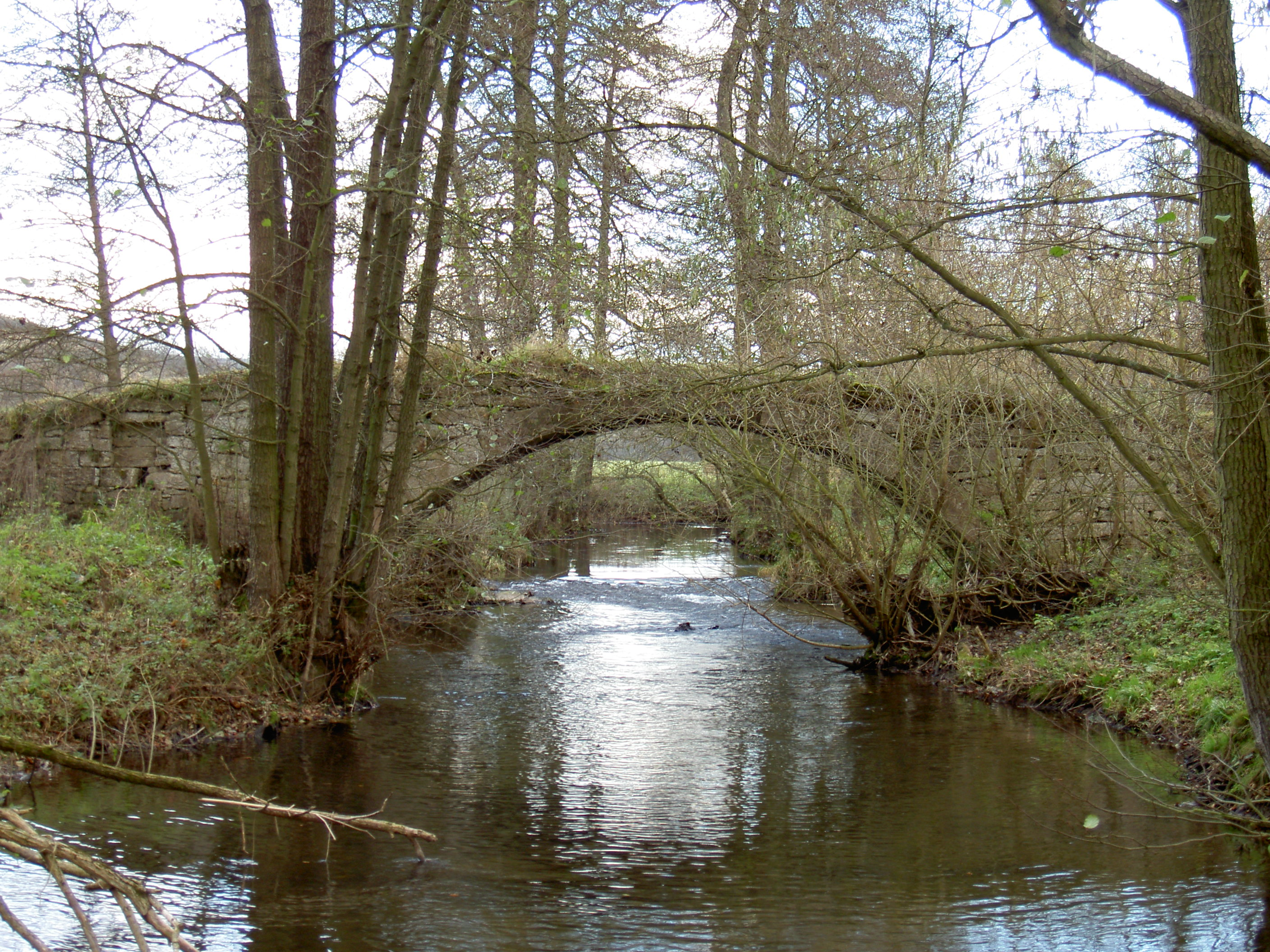 Diese Steinbogenbrücke überspannt das Flüsschen Hasel (Nebenfluss der Werra) in der Nähe des Ortsteils Kloster, 98530 Rohr. Die Brücke soll mit ca. 500 Jahren die älteste Steinbogenbrücke im Landkreis Schmalkalden-Meiningen sein. Leider ist die Steinbogenbrücke baufällig und für jeglichen Verkehr gesperrt. Die Brücke bedarf dringend einer Sanierung. Die Gemeinde Rohr ist finanziell leider nicht in der Lage, die Sanierung der historischen Brücke in Auftrag zu geben.